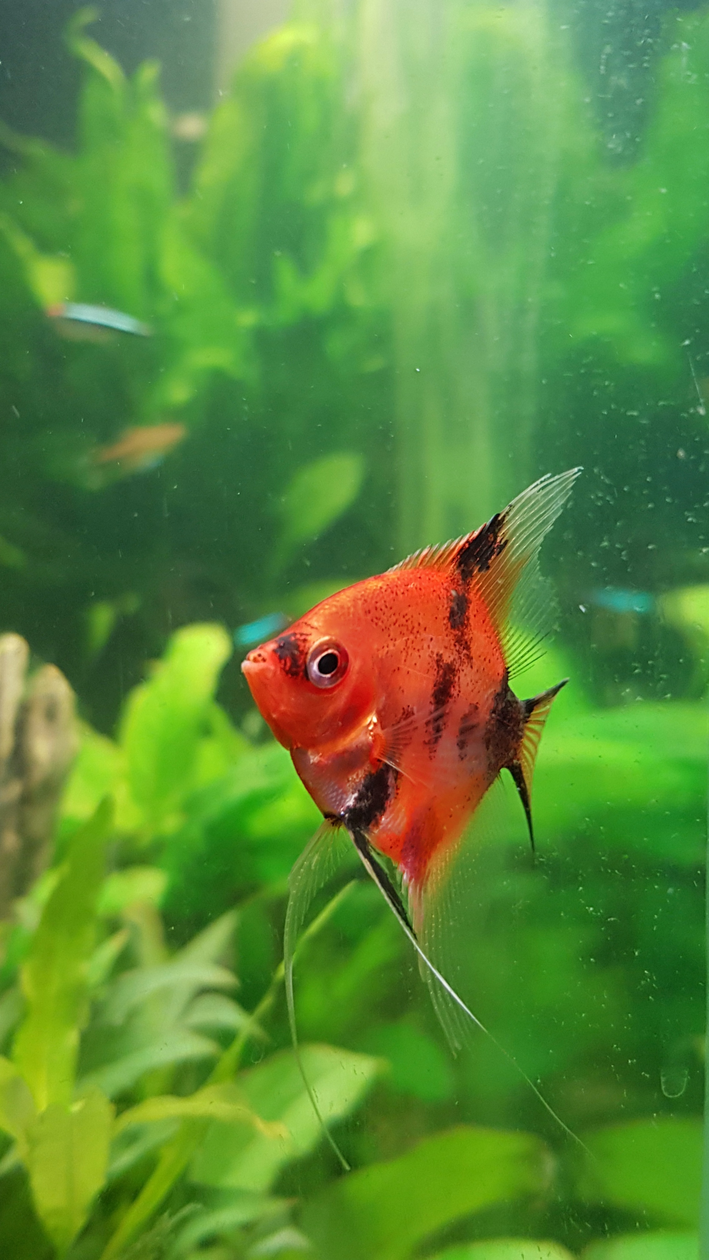 Variedad de pez Escalar denominada comercialmente como Red Devil